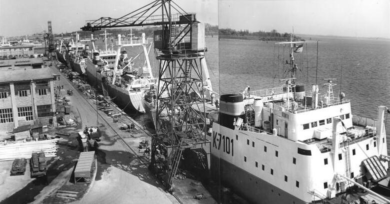 Stralsund, Volkswerft Stralsund, Ausrüstungskai, "Atlantik" Zentralbild Kohls krue 18.5.1967 50 Jahre Sowjetmacht Roststock: "Atlantiks" am Ausrüstungskai des VEB Volkswerft Stralsund, dessen Werktätige zu Ehren des 50. Jahrestages der Großen Sozialistischen Oktoberrevolution zur Weiterführung des sozialistisch Wettbewerbes aufgerufen haben. (Panorama)" Information added by Wikimedia users.Volkswerft in Stralsund.